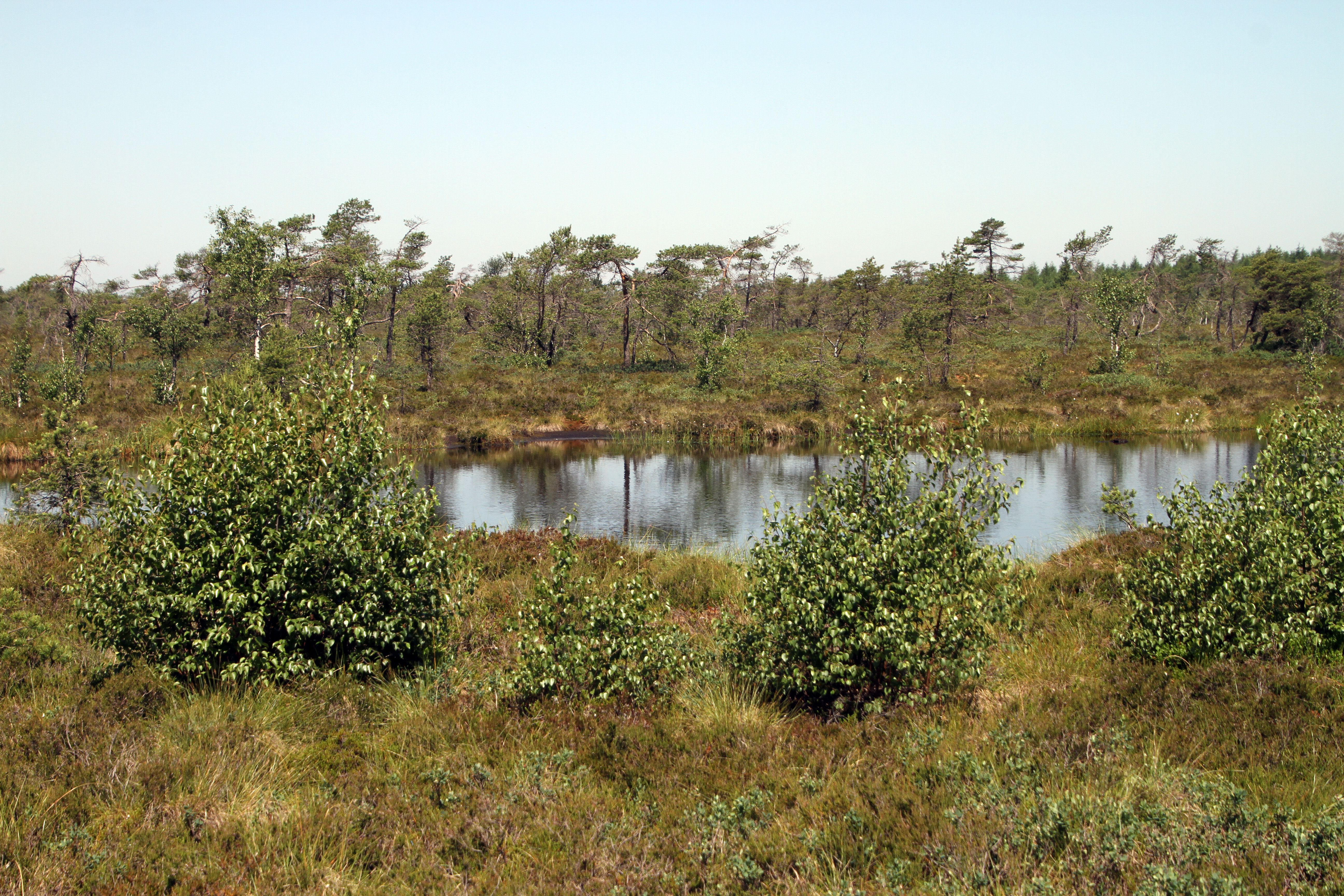 Schwarzes Moor in der Rhön in Hessen